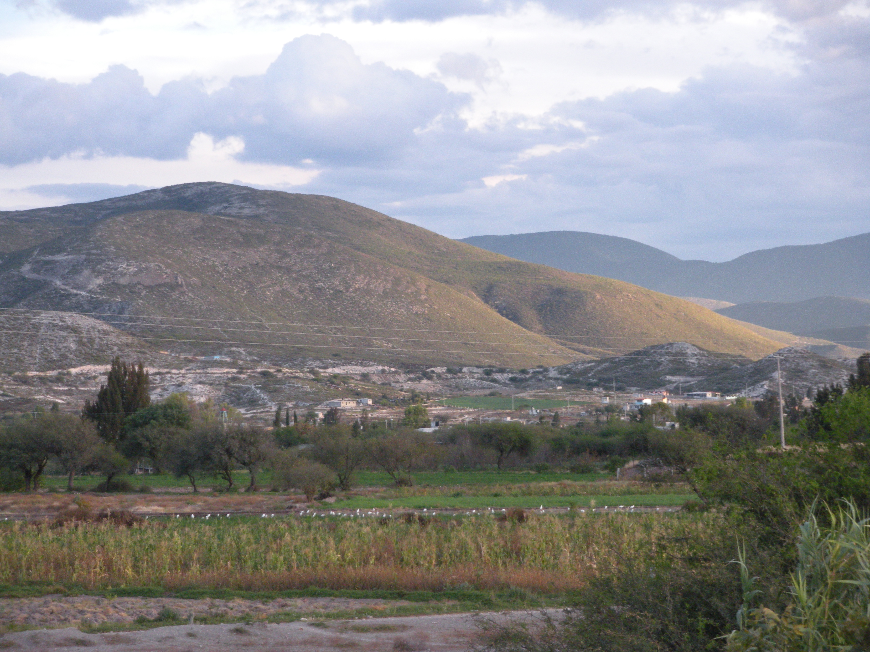 pajaros